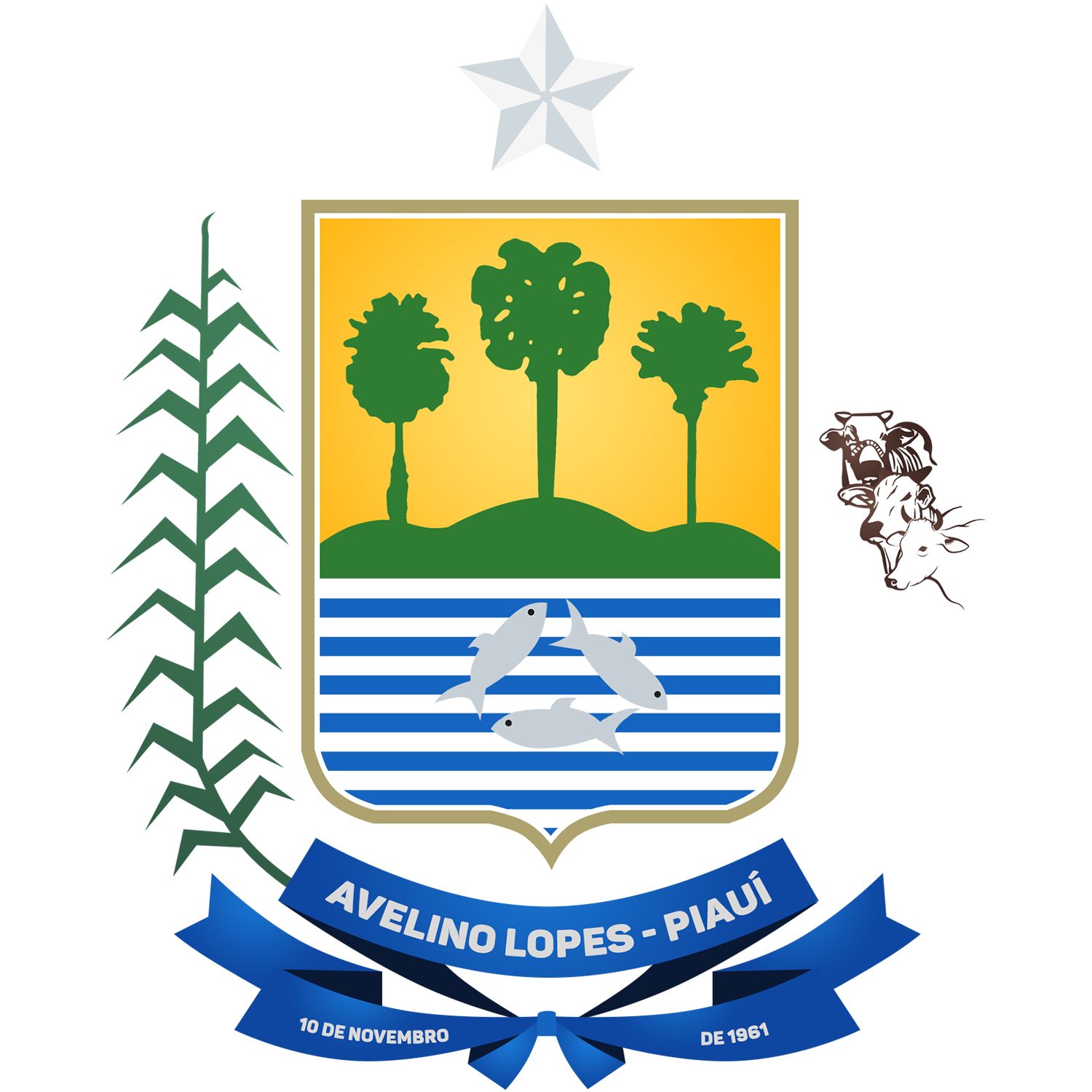 Brasão da cidade de Avelino Lopes revisto e atualizado. De domínio público. Atualização feita para aproximar o brasão da realidade e com mais qualidade.